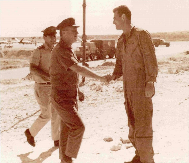 אריה בן-אור, מפקד טייסת 147, והרמטכ"ל, יצחק רבין